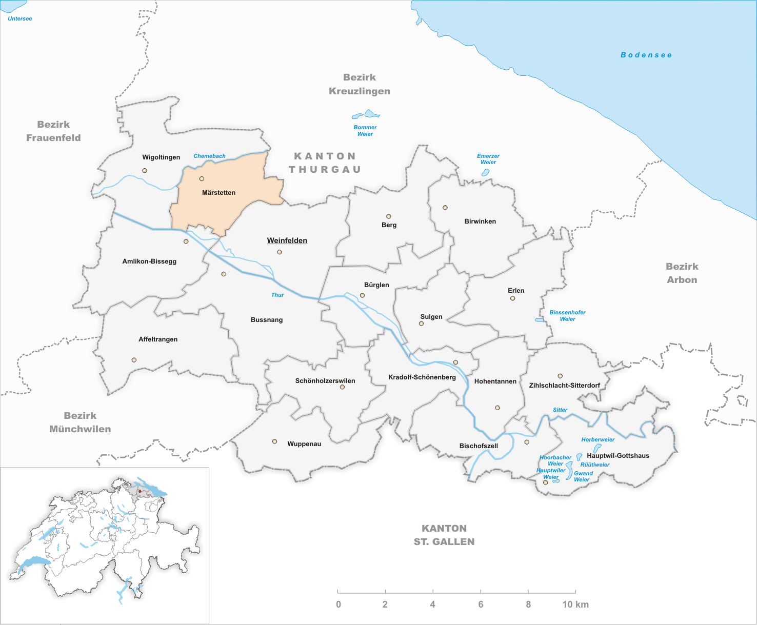 Municipality Märstetten